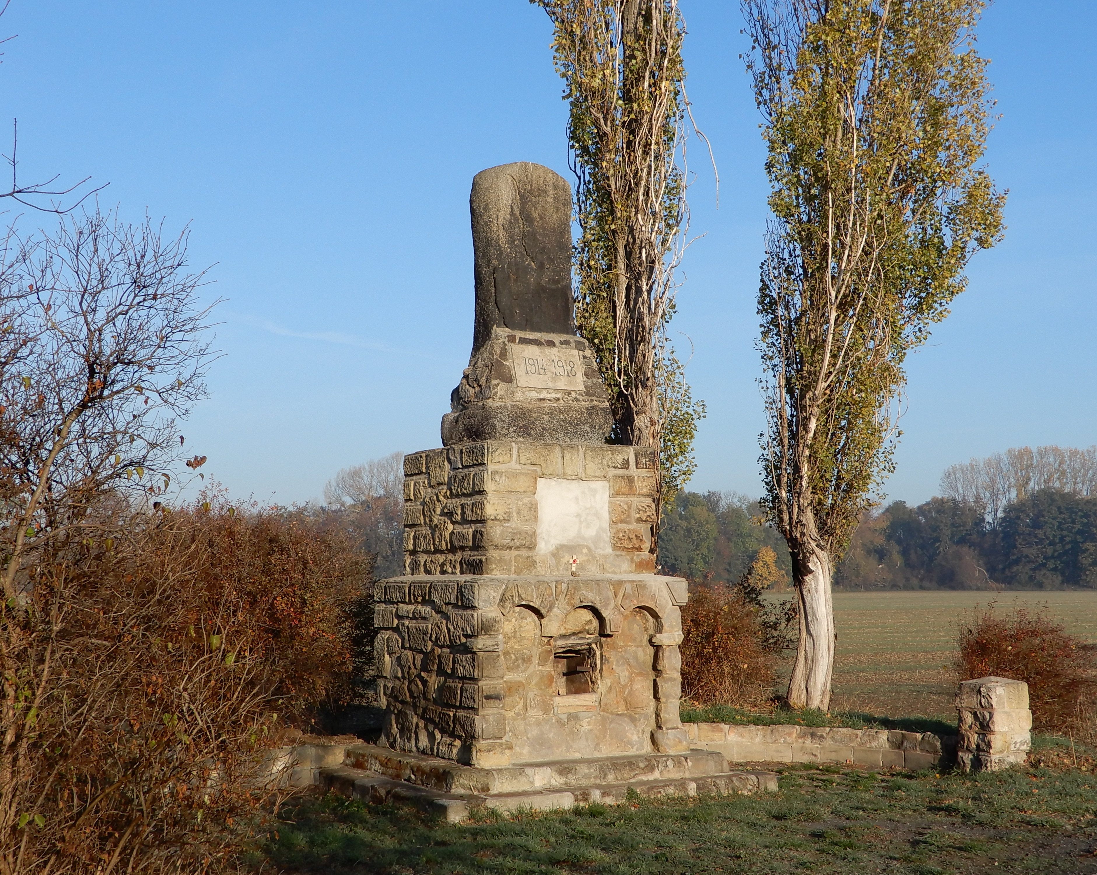 Denkmal zur Erinnerung an das Kriegsgefangenenlager Quedlinburg 1914-1922